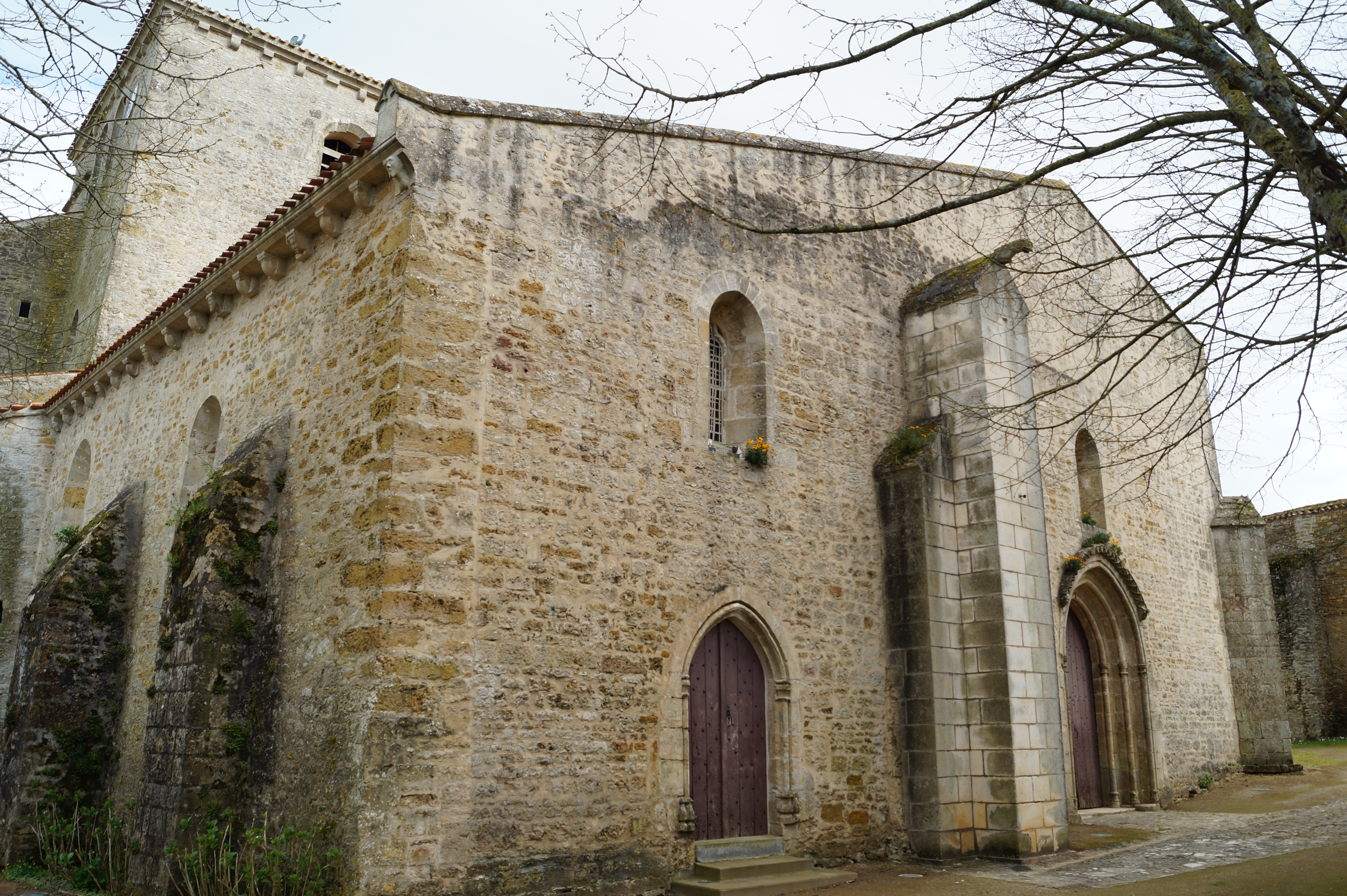 Le portail de l’église Notre-Dame-de-l’Assomption de Bazoges-en-Pareds depuis la place.